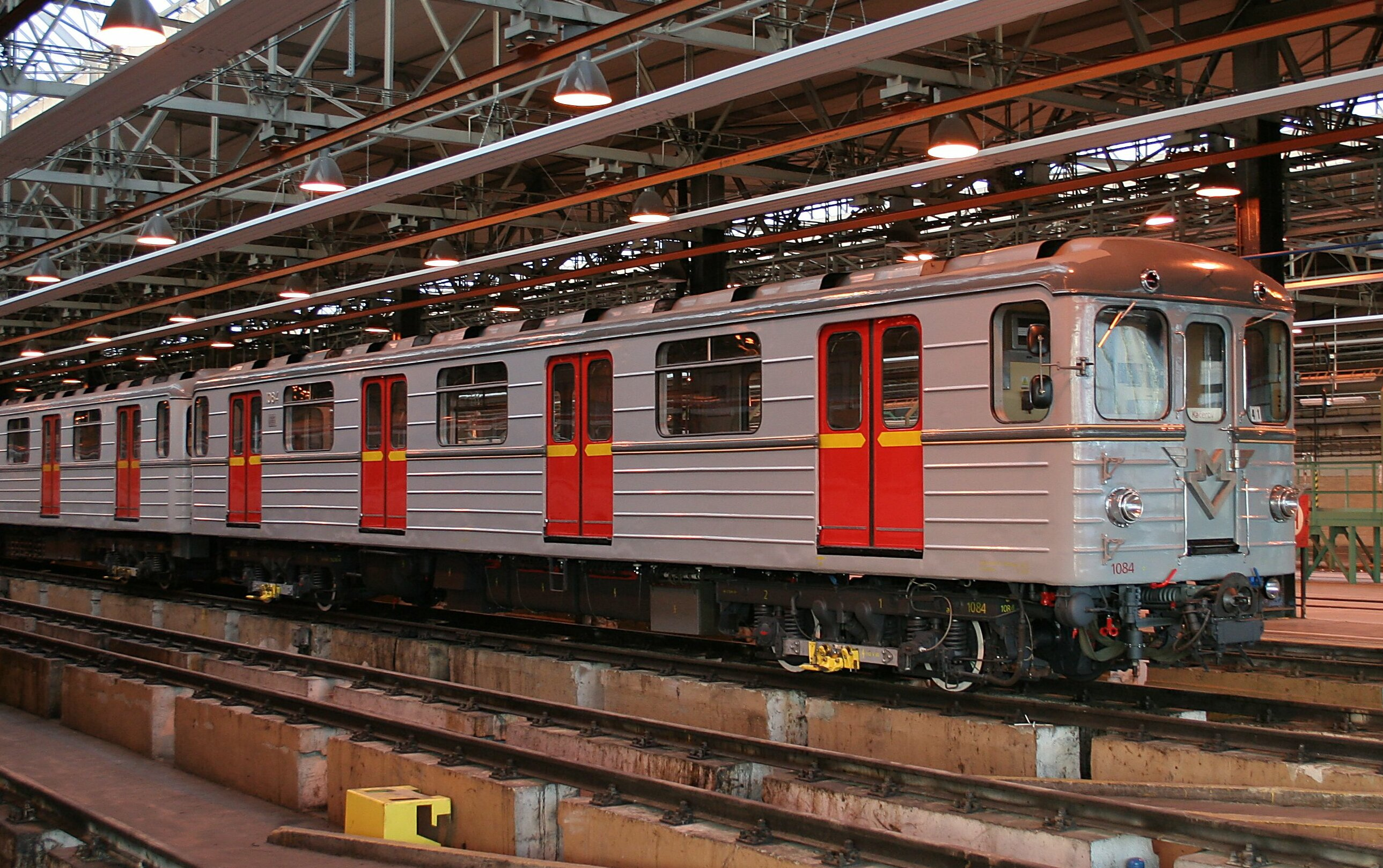 Starý vlak v kačerovském depu. photo: che, special thanks to Smidlu